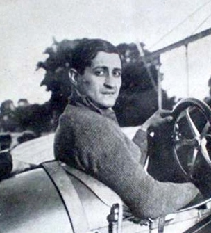 El aviador paraguayo Pettirossi quien ha perfeccionado las acrobacias aéreas de Adolphe Pégoud, en el Jockey Club de Rio de Janeiro listo para realizar uno de sus vuelos.